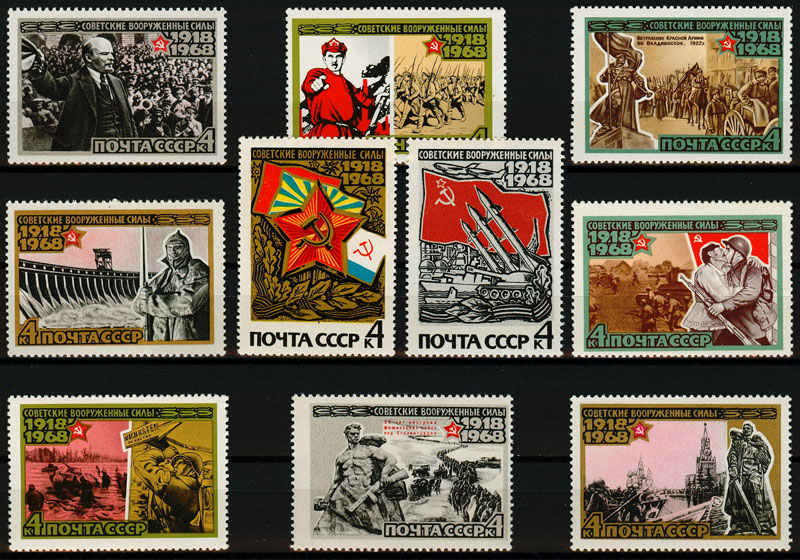 Почтовые марки "50 лет Вооружённым силам СССР"